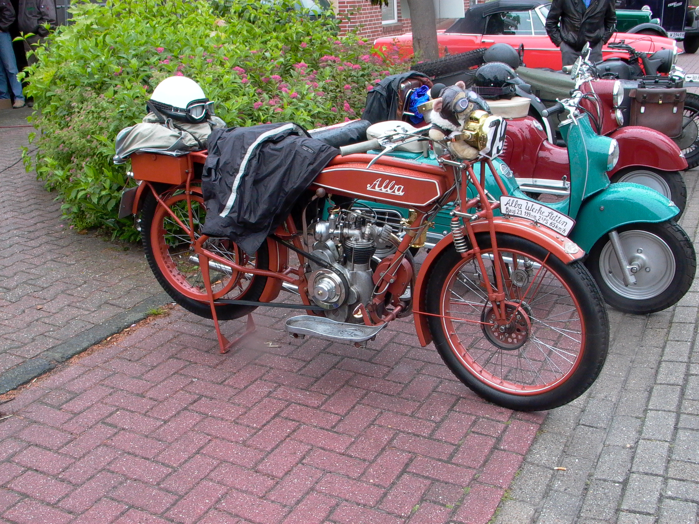 Motorrad Alba, 199 cm Einzylinder-Viertaktmotor, 2,5 PS Baujahr 1923